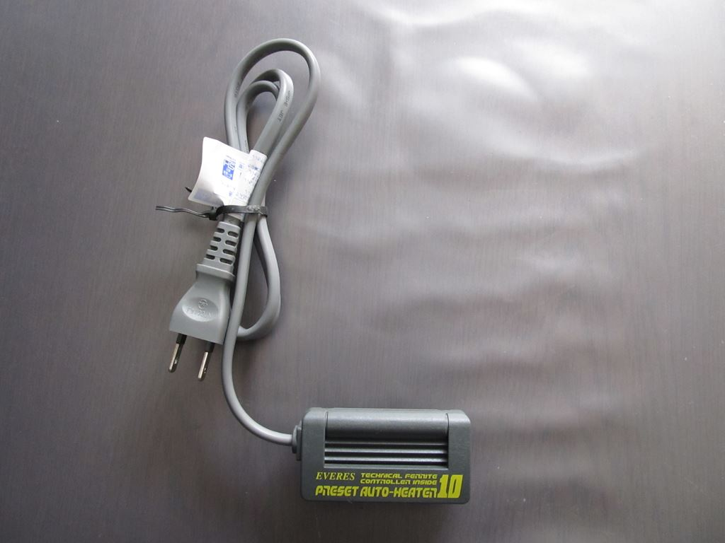 preset auto heater 10 (mini)